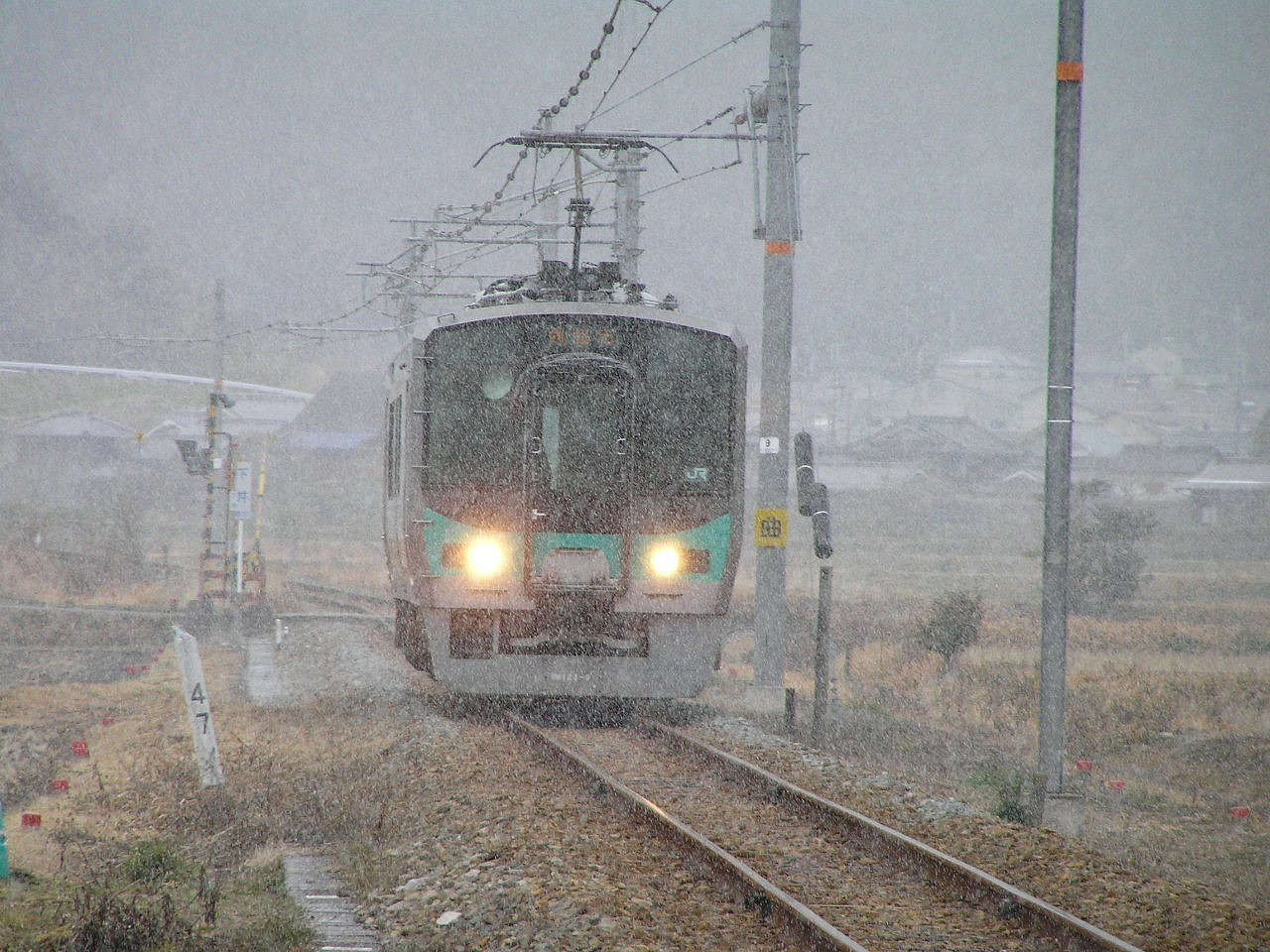 加古川線（谷川ー久下村）丹波市